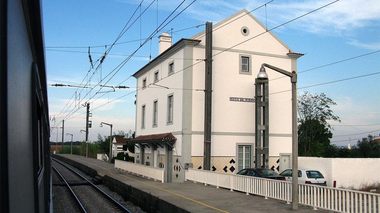 Linha do Norte, foto tirada a bordo do SudExpress